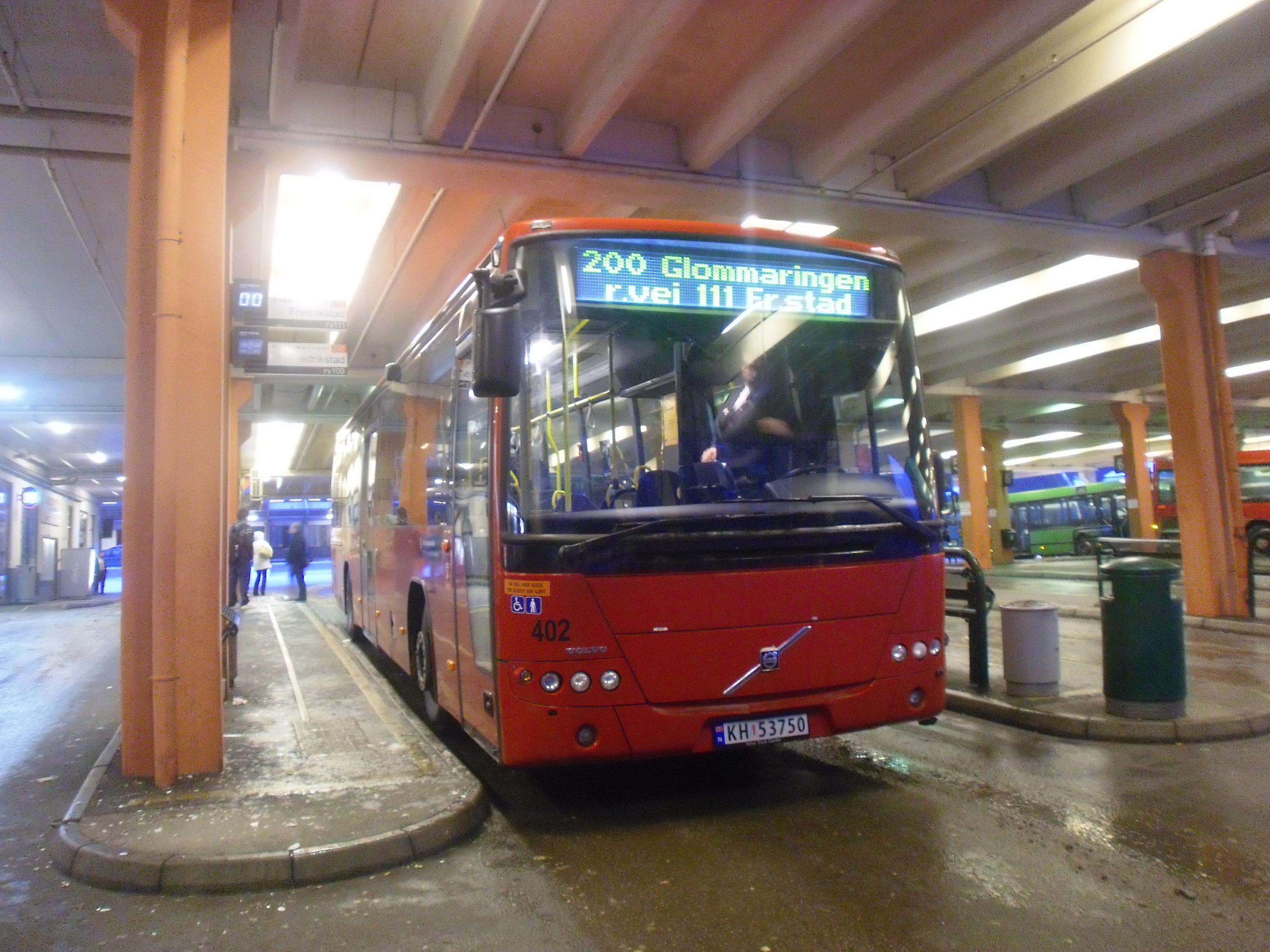 Glommaringen-buss ved Sarpsborg busstorg